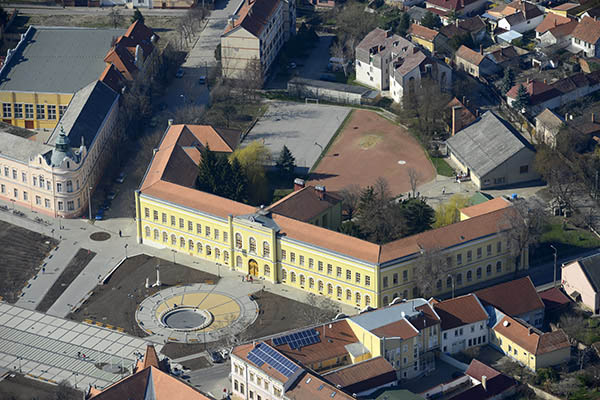 Légi fotó a hajdúböszörményi Bocskai István Gimnáziumról